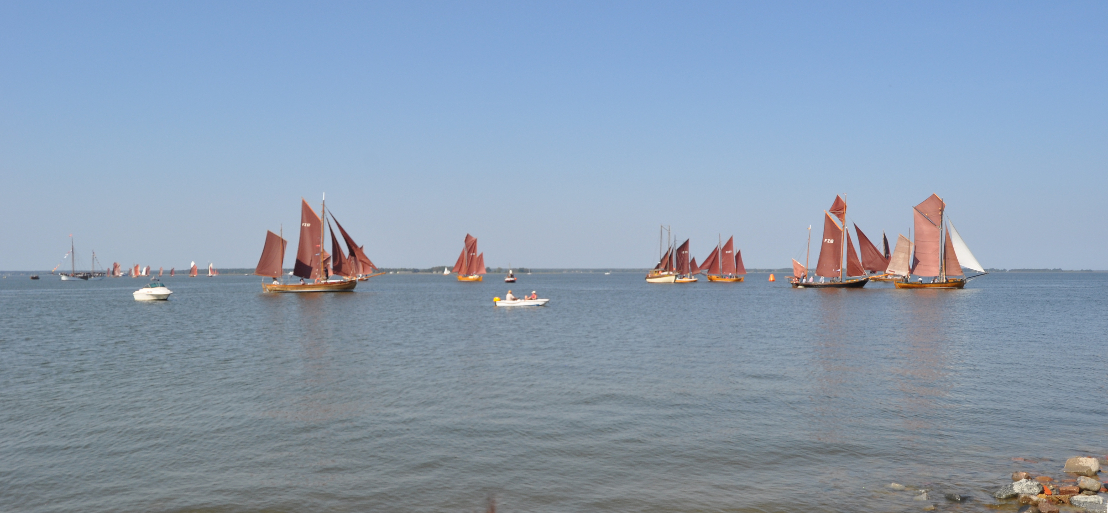 50. Zeesenbootregatta in Bodstedt